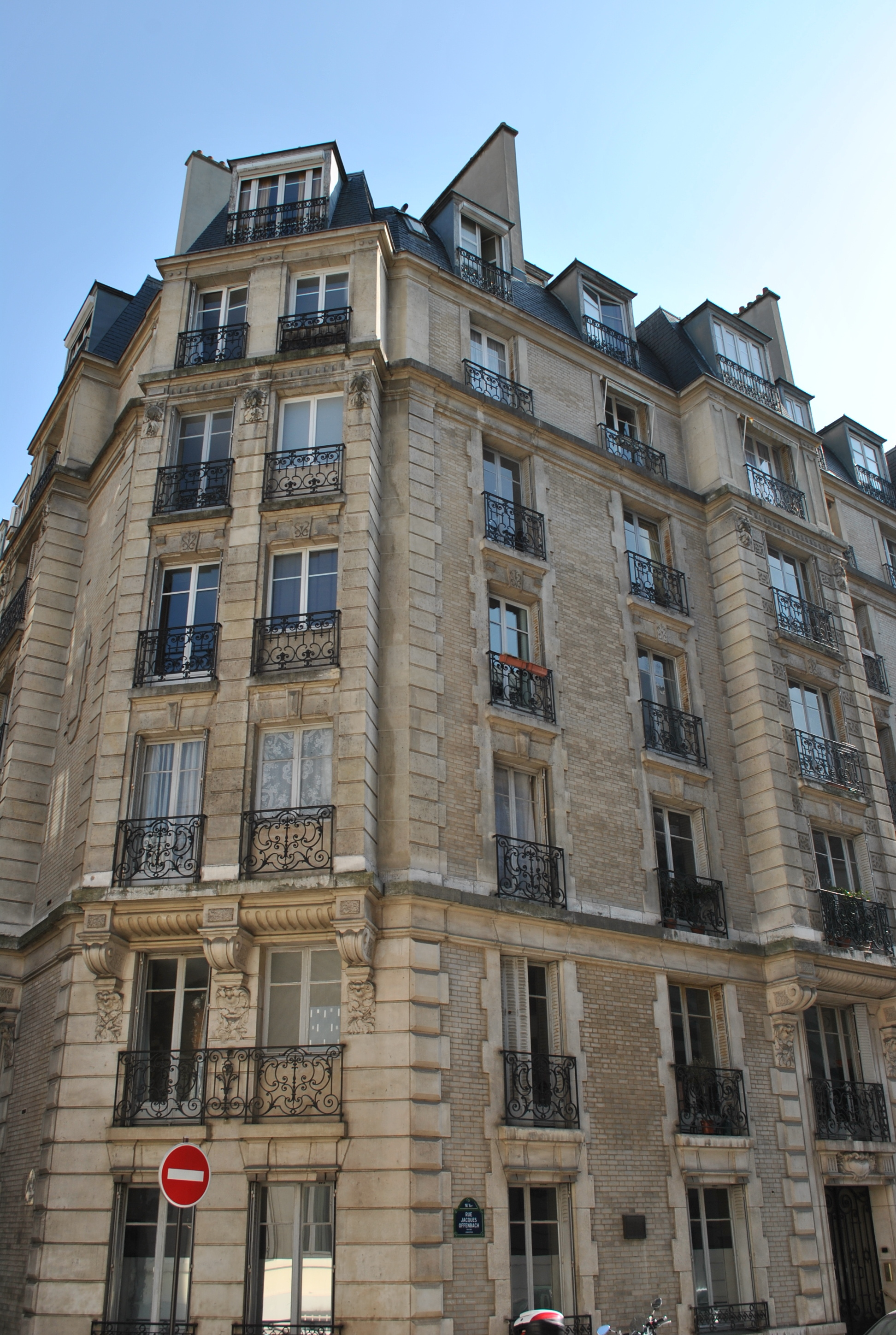 Dom v Paríži, v ktorom žil I. A. Bunin v rokoch 1920 - 1953